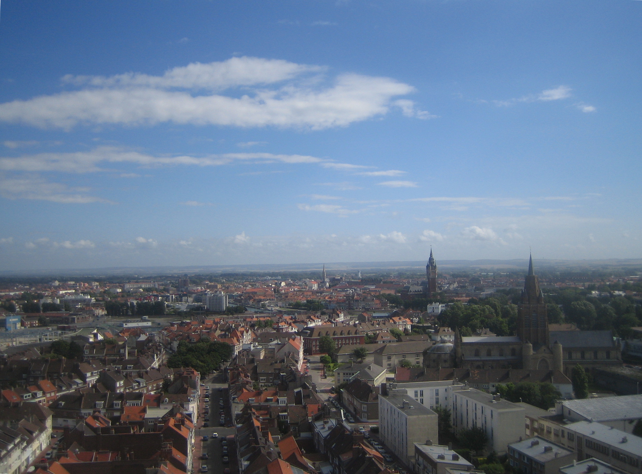 Calais.